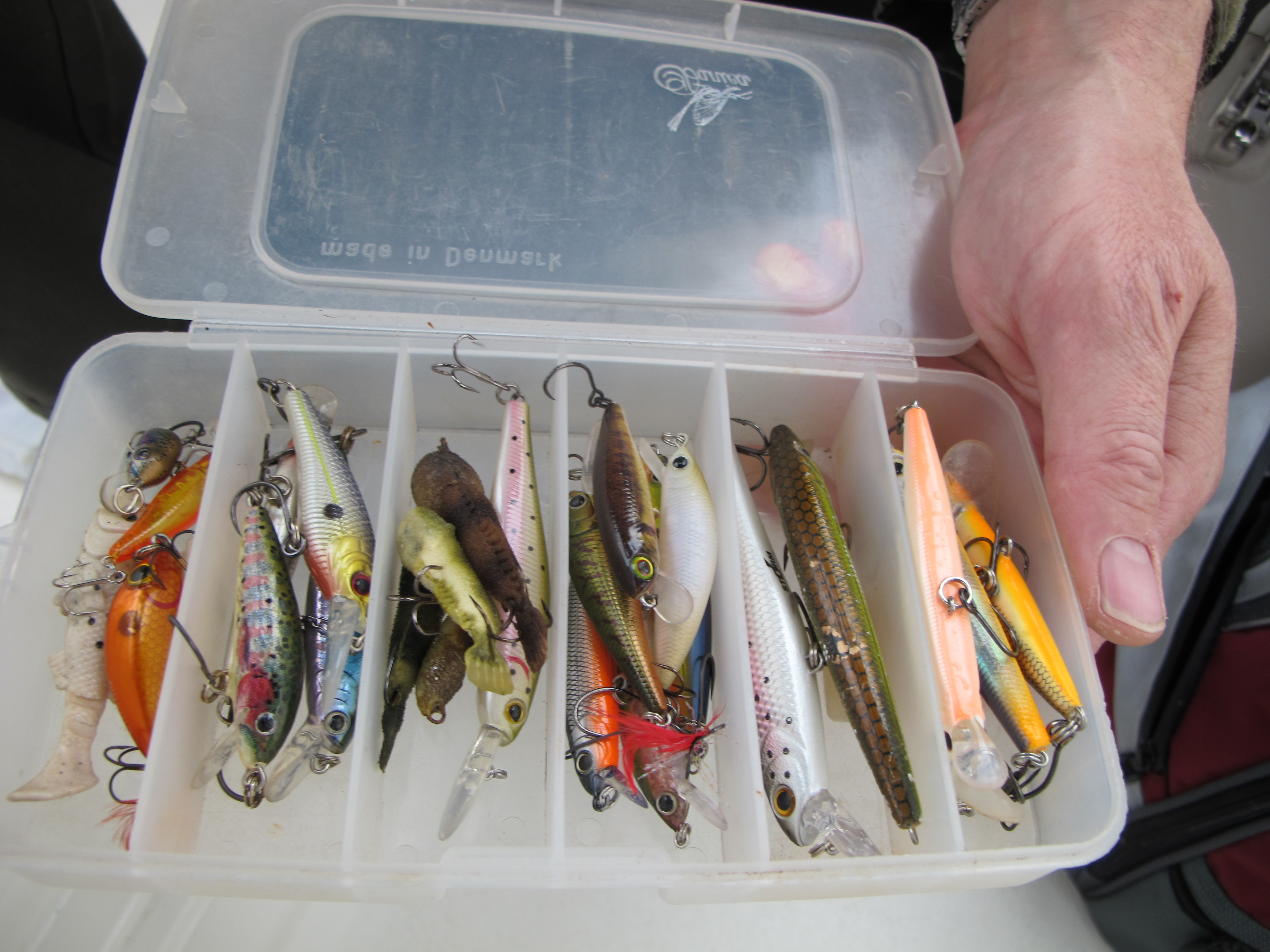 Kleinere Köder für Forellen, Widerhaken verboten, der Kursleiter zeigte, wie man mit der Zange den Haken zudrückt